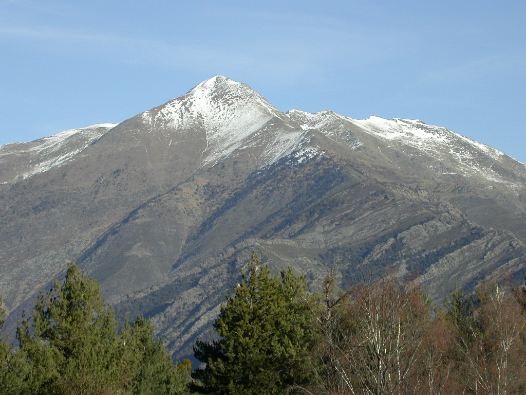 Pic de Monteixo des de les Bordes de Virós